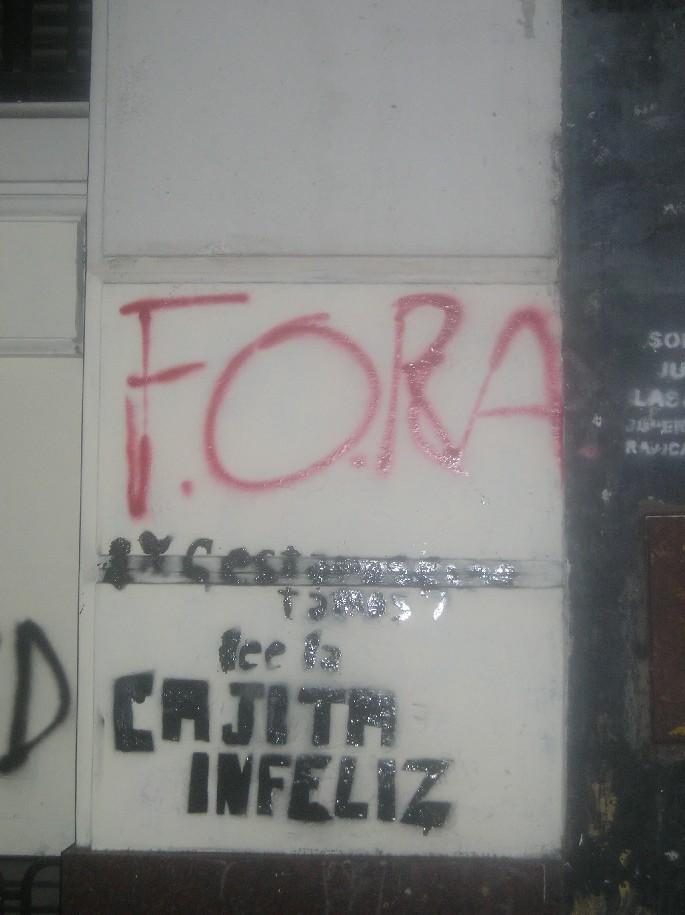 Grafiti de la F.O.R.A, pintada en pared de Buenos Aires.